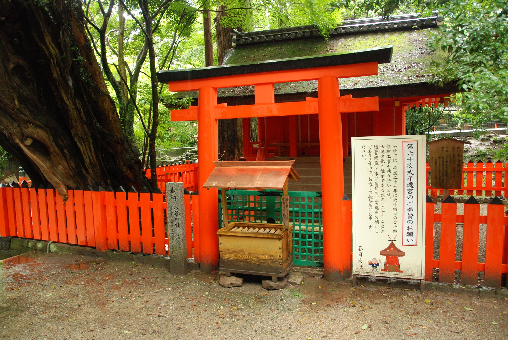 Kasuganocho, Nara, Nara Prefecture 630-8212, Japan